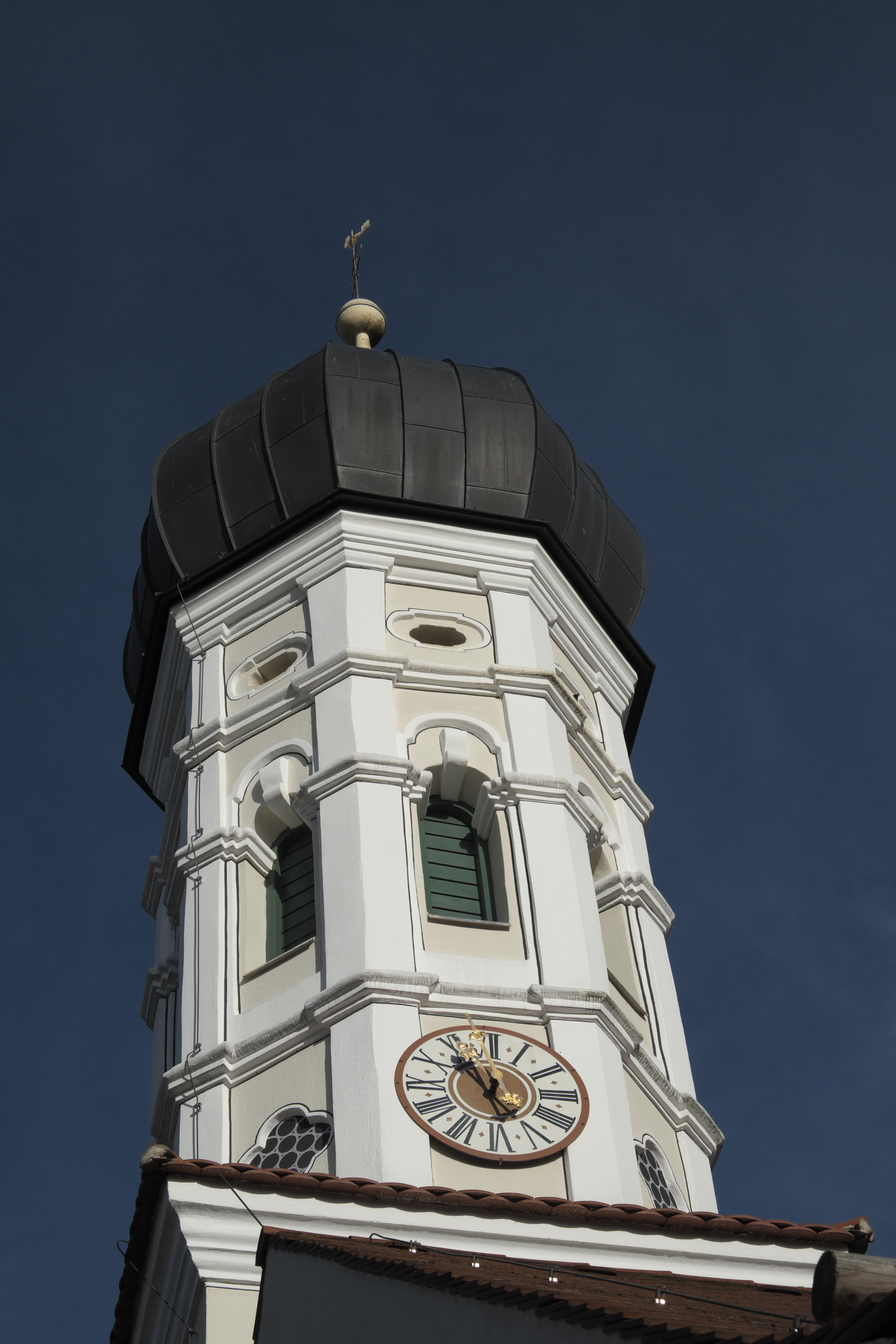 St. Pankratius in Mitterfischen (Pähl) im Landkreis Weilheim-Schongau (Bayern/Deutschland), Turm